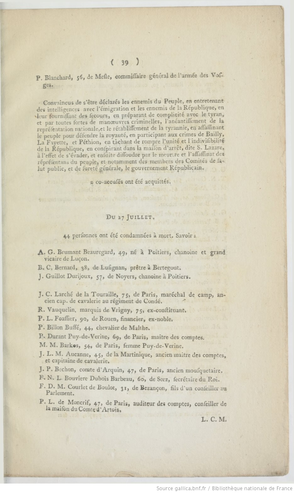 Jugement de Jean-Chrysostome Larcher